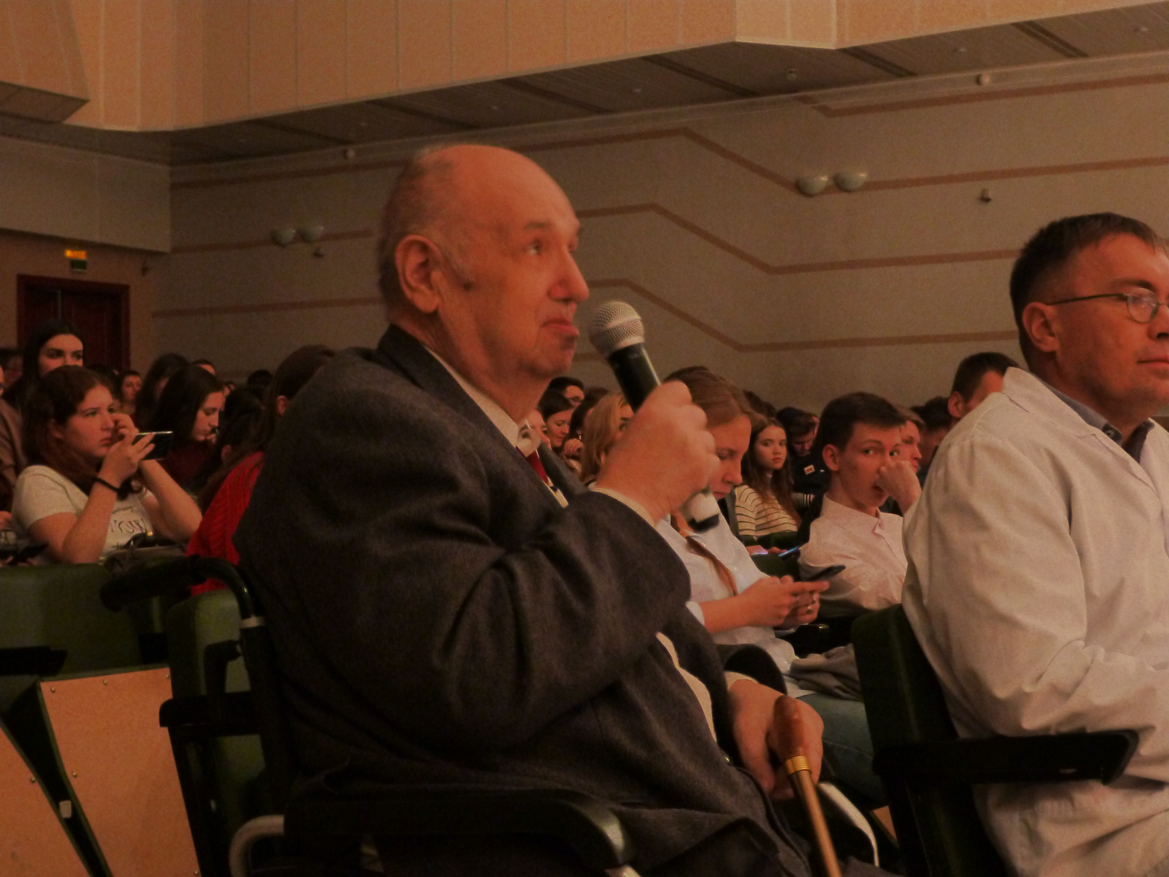 Станислав Степанович Набойченко в госпитале 2019 год